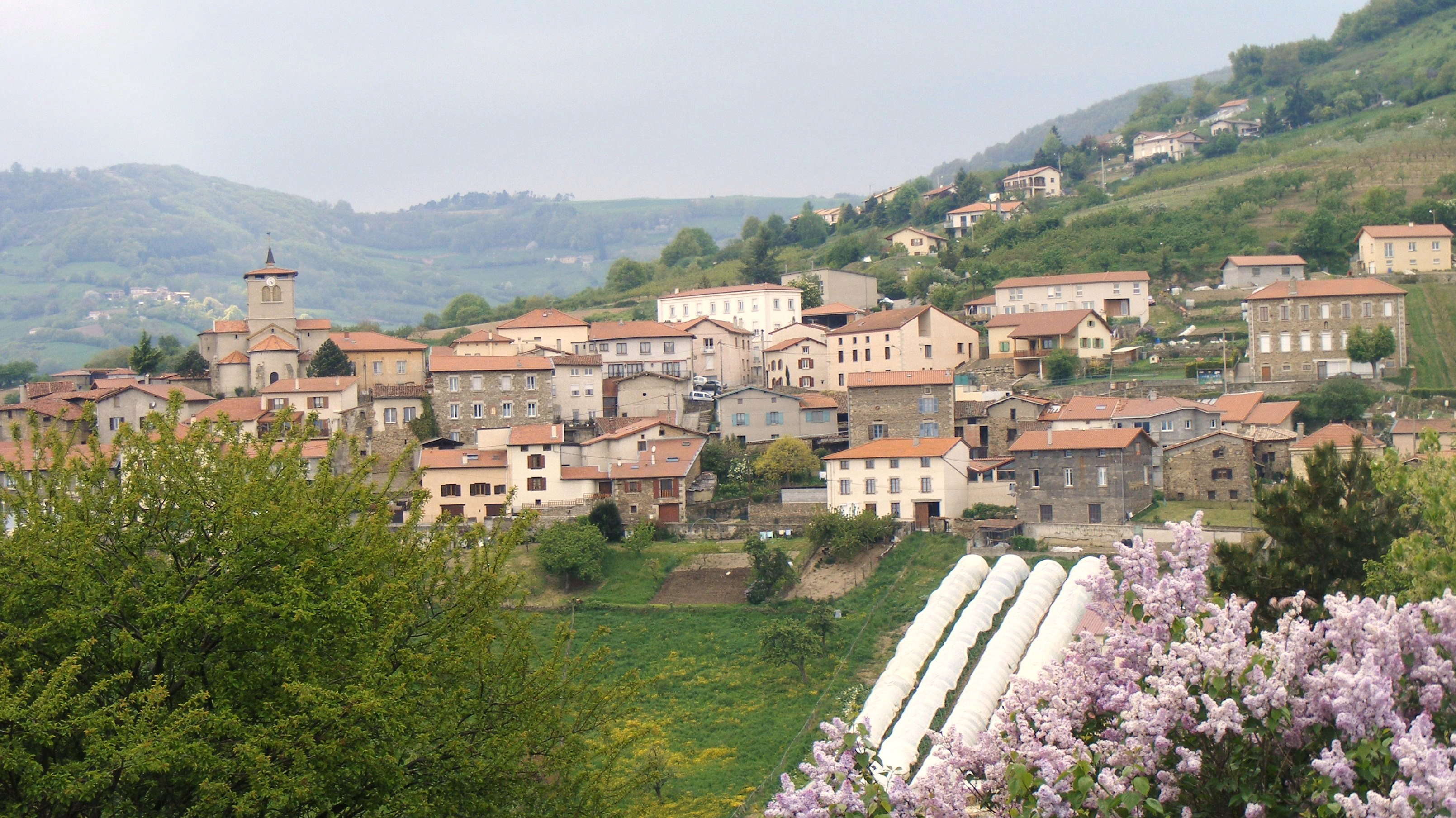 Saint-Romain-en-Jarez; vue générale